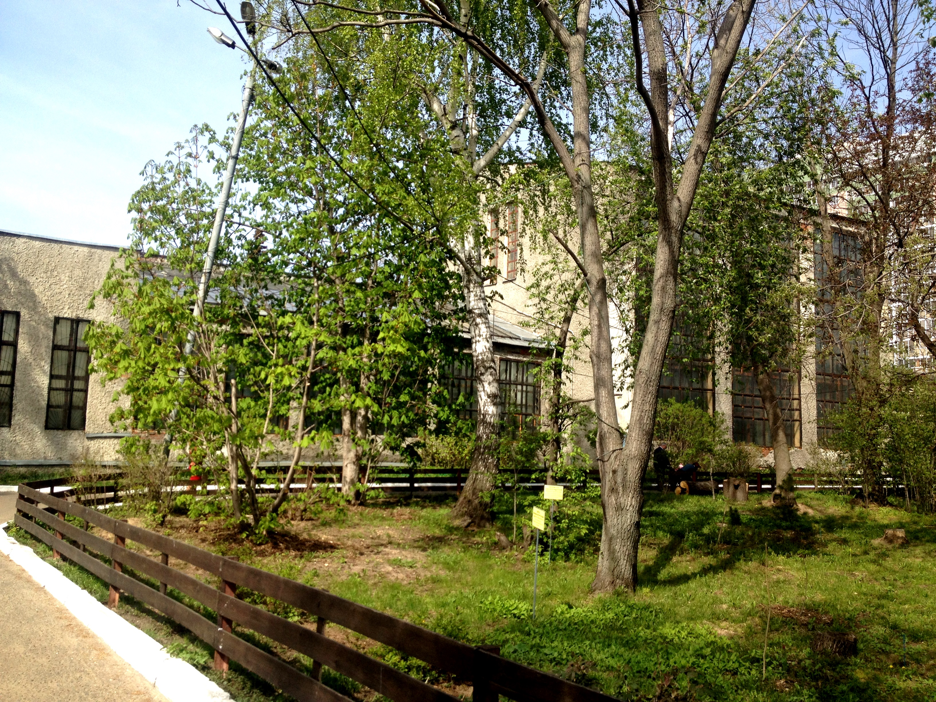 Казанский зооботанический сад, ботанический отдел, Казань This image is related to the protected area of Russia number 1600096